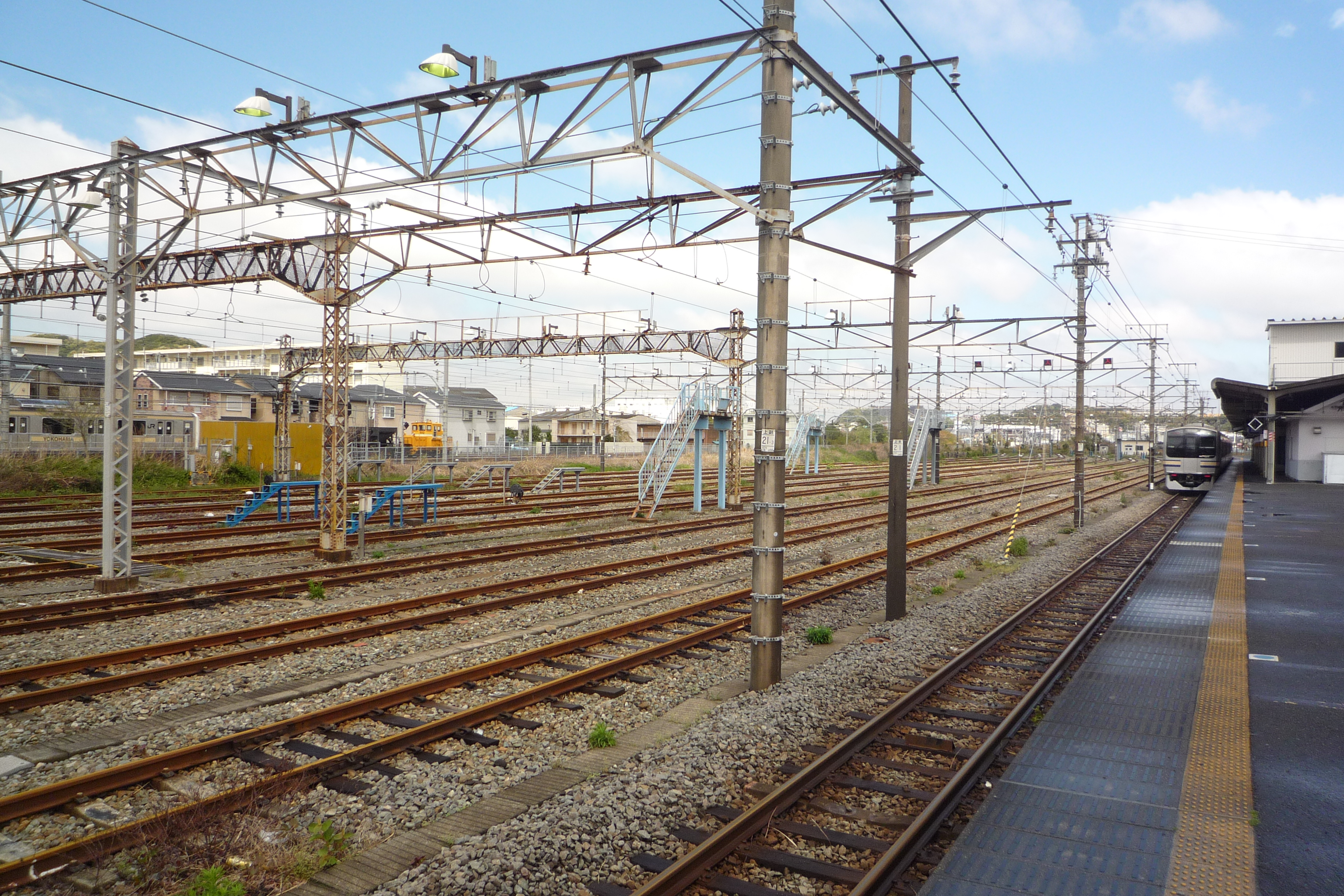 久里浜駅側線、左側には訓練センターの車両が写っている。